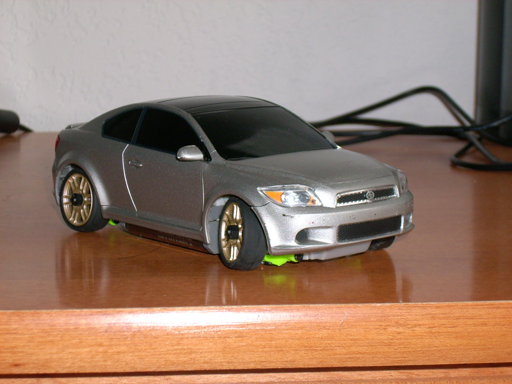 Xmosd Scion tc